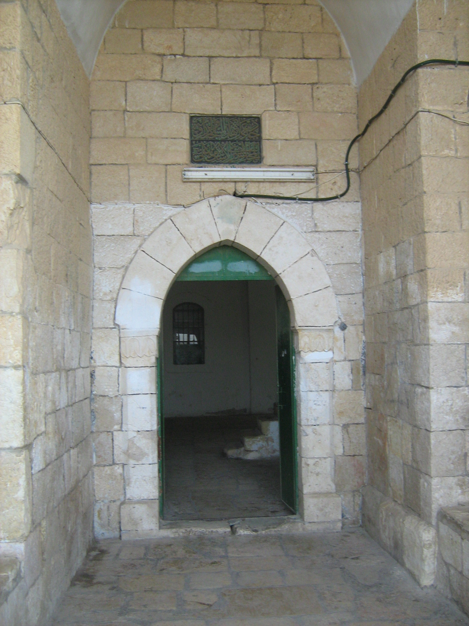 נבי סמואל